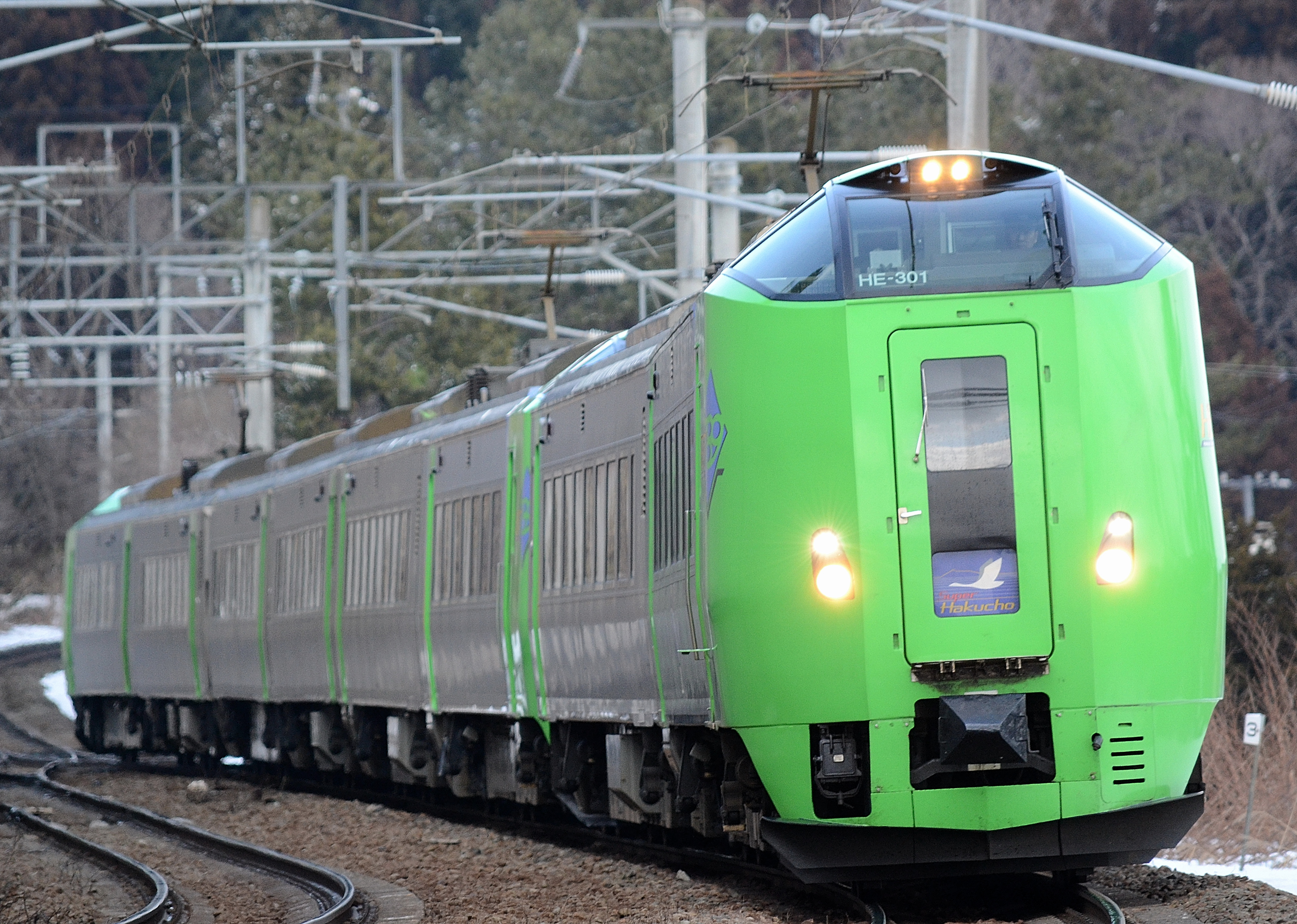 釜谷駅を通過する789系交流電車の特急「スーパー白鳥｣24号